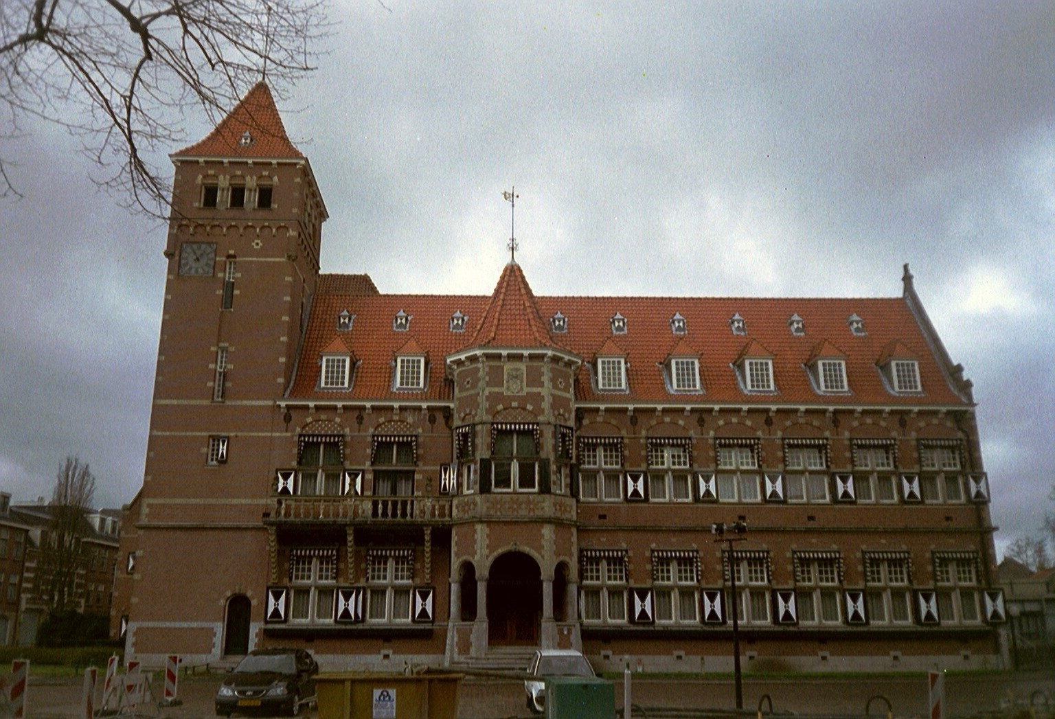 Gemeentehuis, Het Rond 1, Zeist. Foto genomen op 11 april 2004 en geupload door maker.